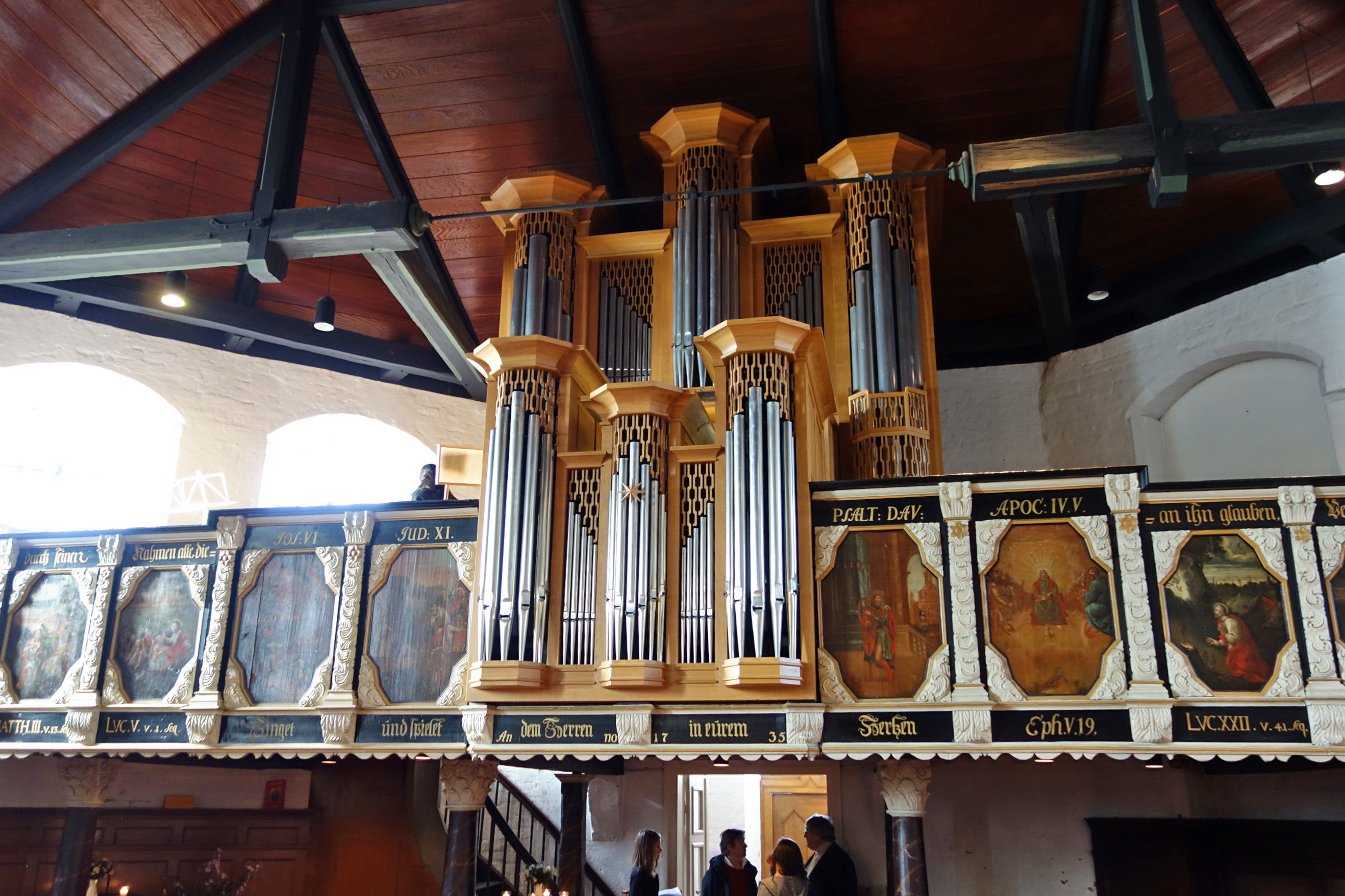 Orgel in Lübeck, St. Andreas, Schlutup , Schleswig-Holstein